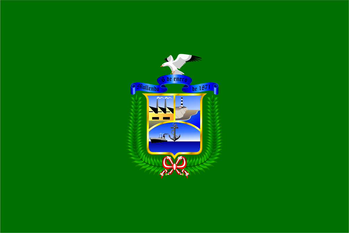 Distrito de Mollendo - Provincia de Islay - Región Arequipa